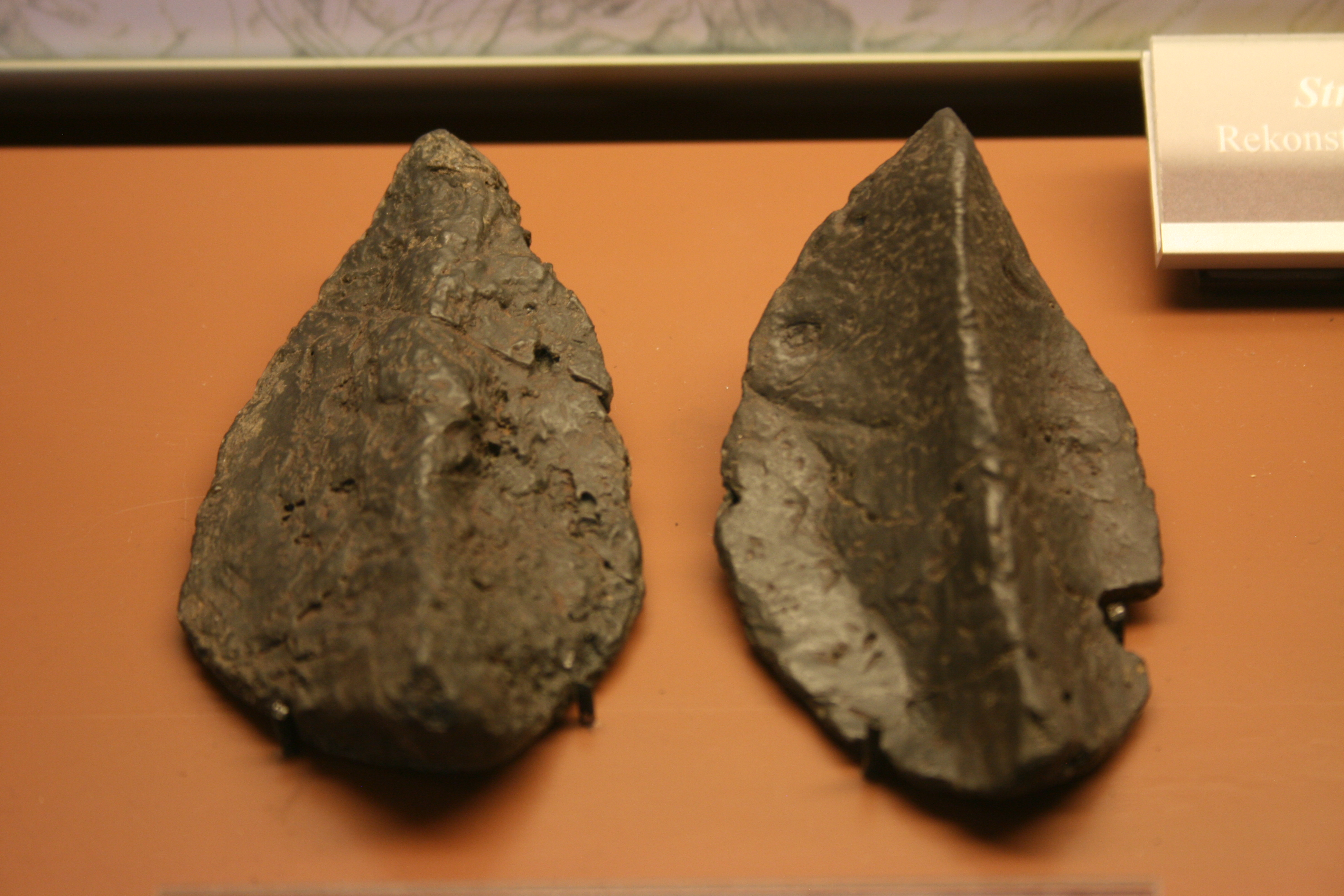 Hauptplatten eines Struthiosaurus austriacus, aus NÖ